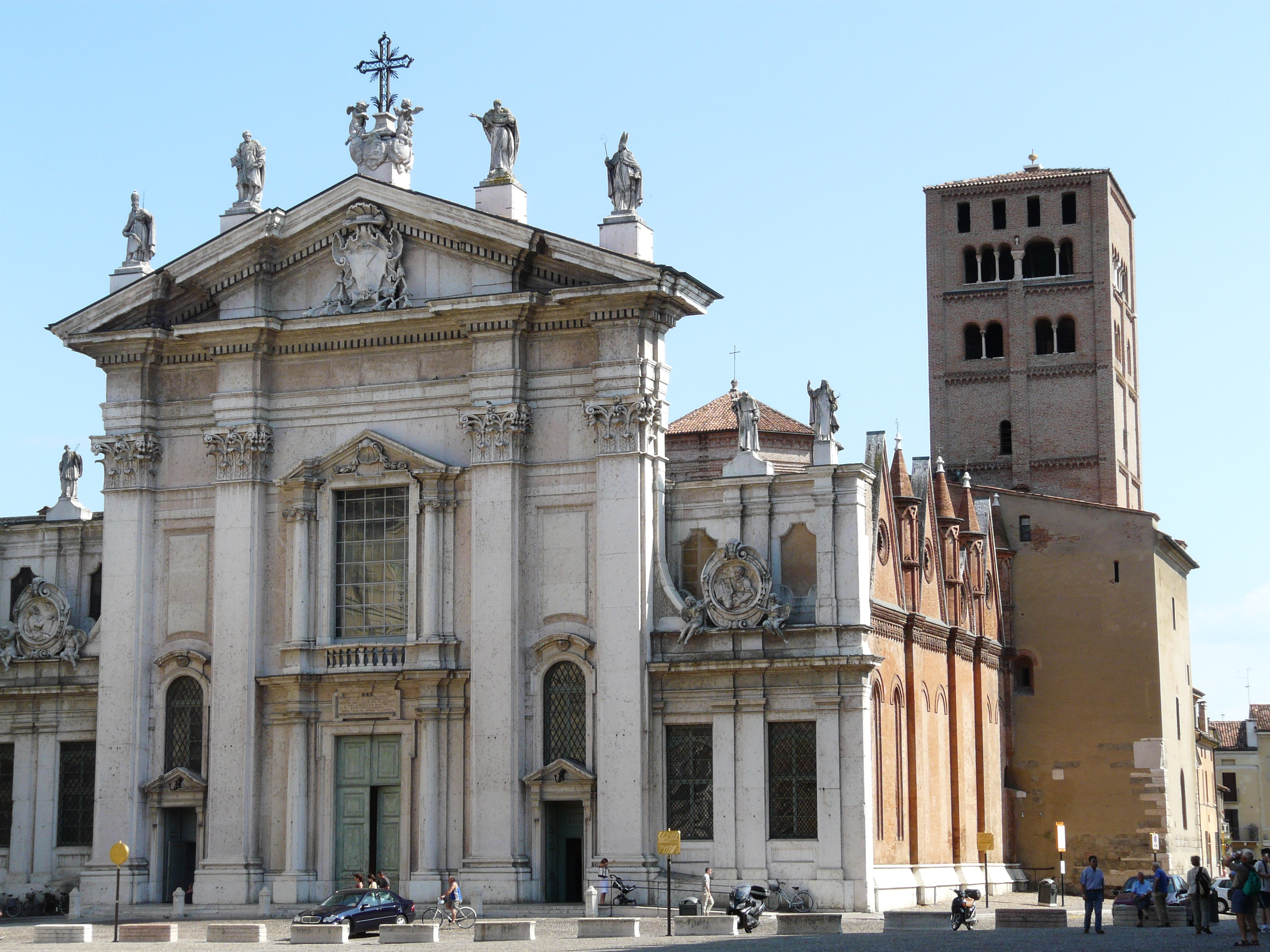 Duomo di Mantova, Lombardia, Italia